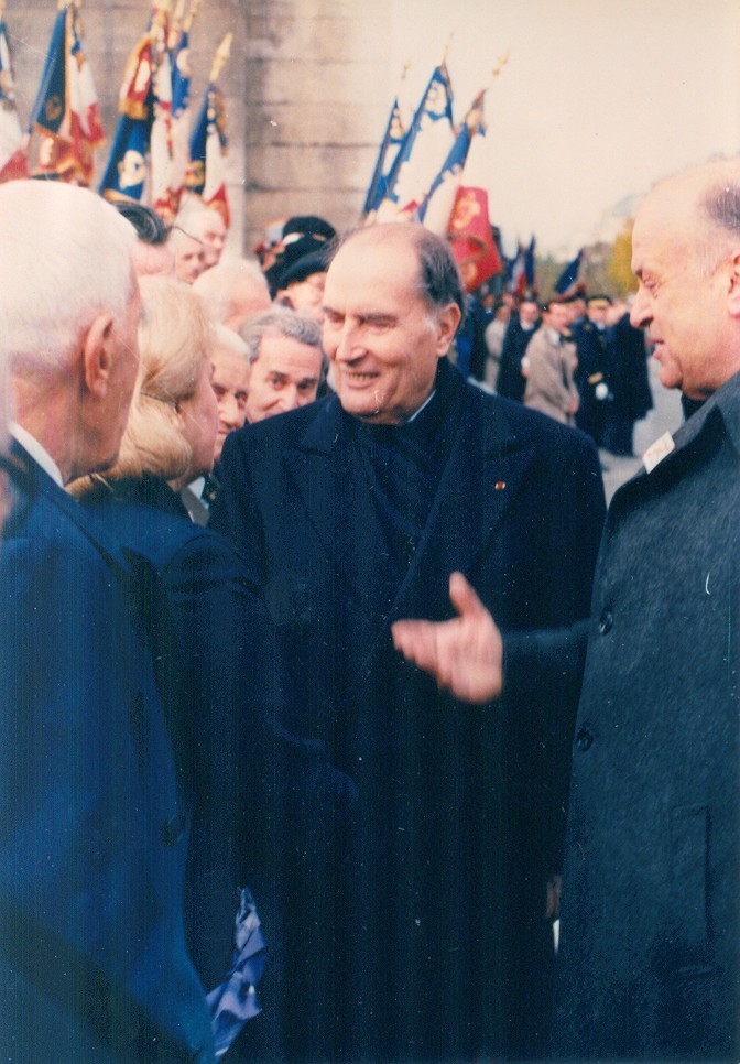 Мира Алечковић и Франсоа Митеран на прослави Дана победе у Паризу код Тријумфалне капије (1987). Уступио Срђа Николић, син Мире Алечковић.